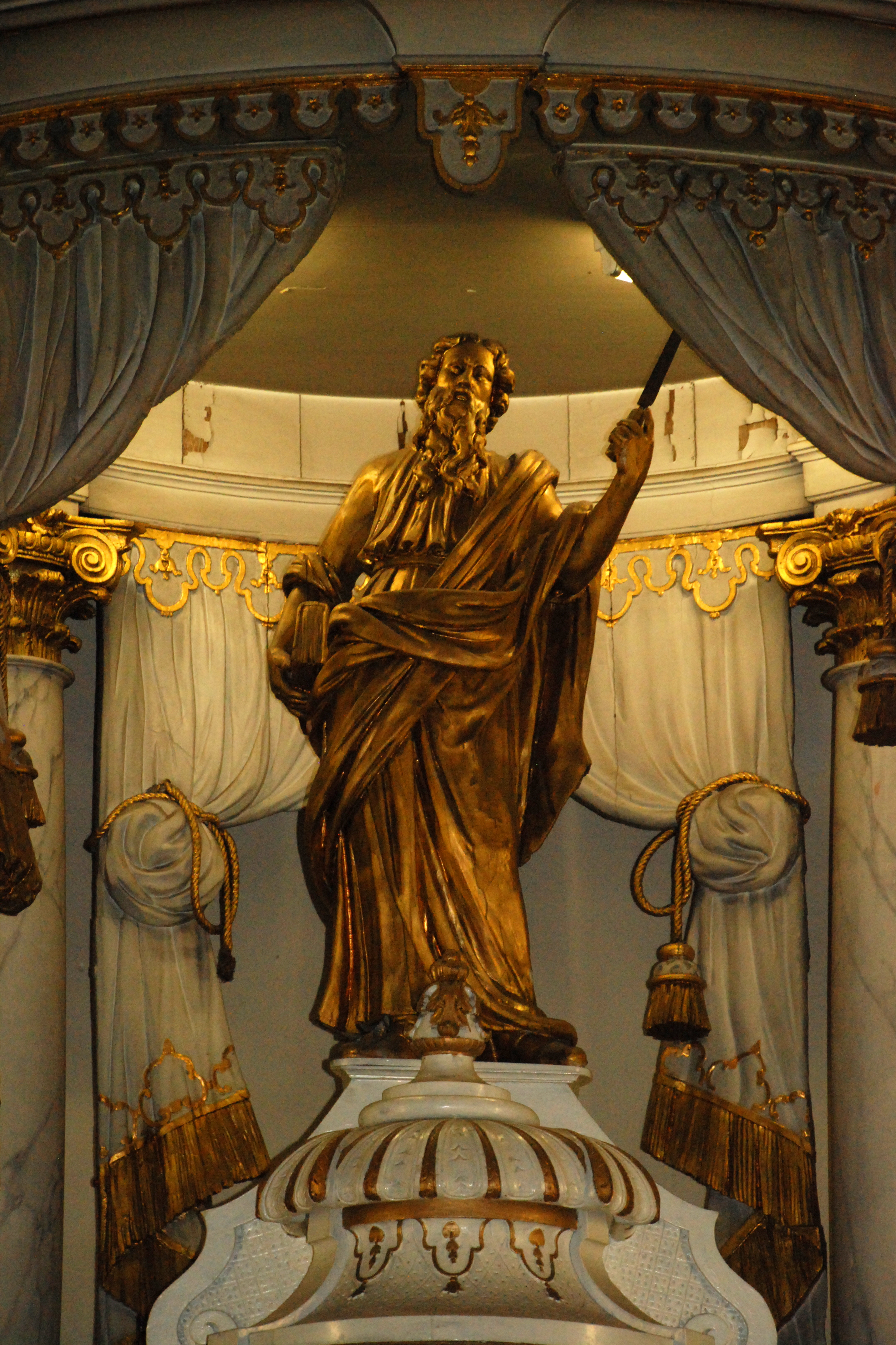 Belgique - Bousval - Église Saint-Barthélemy de Bousval